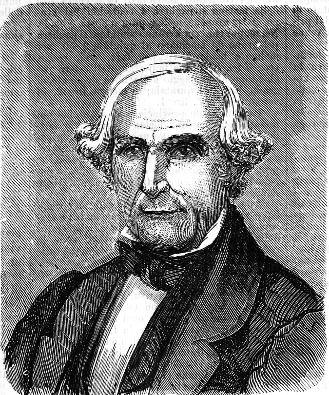 Pietro Tenerani